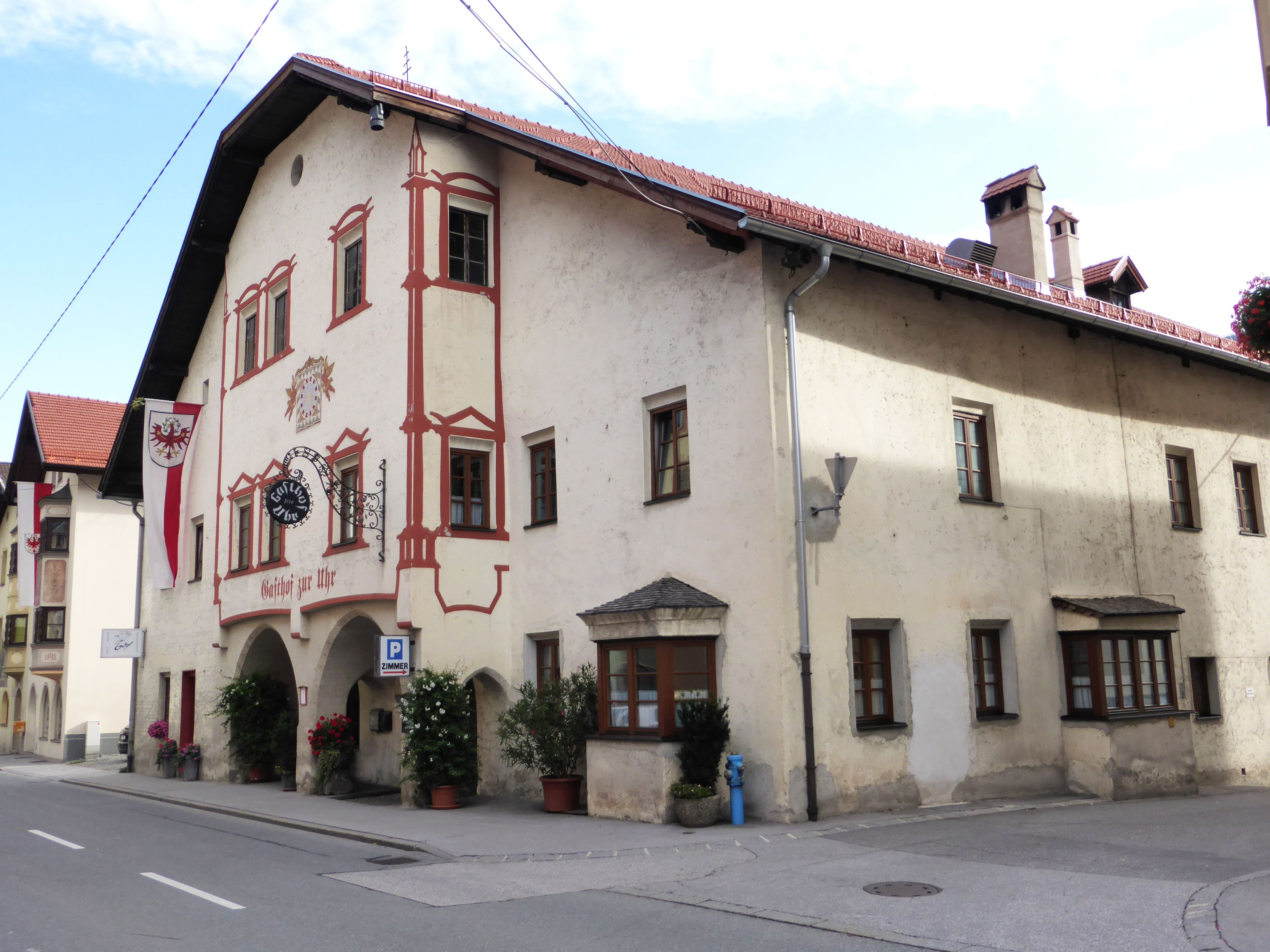 Gasthof Uhr